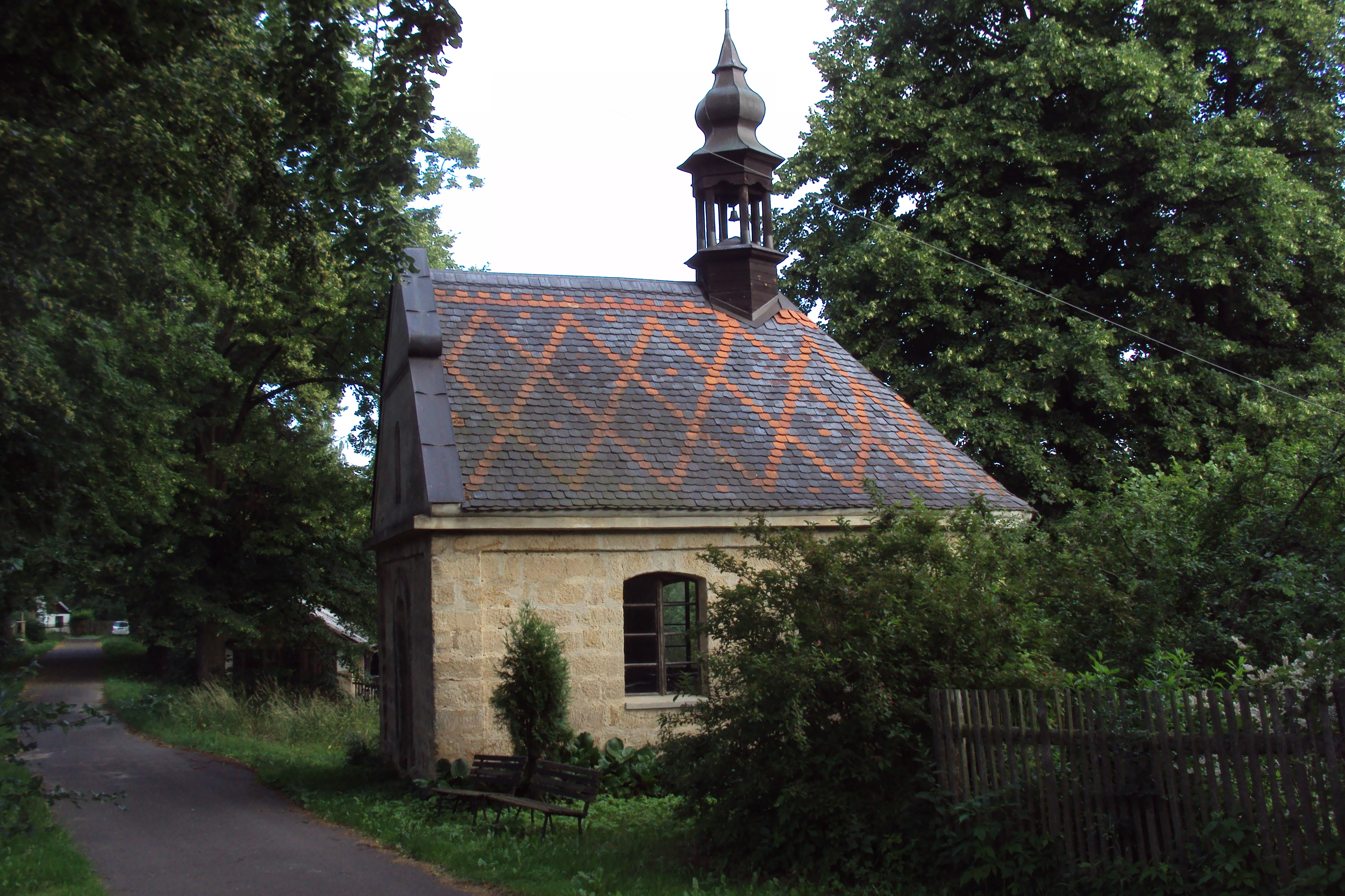 Kaple v osadě Hvězda u Blíževedel